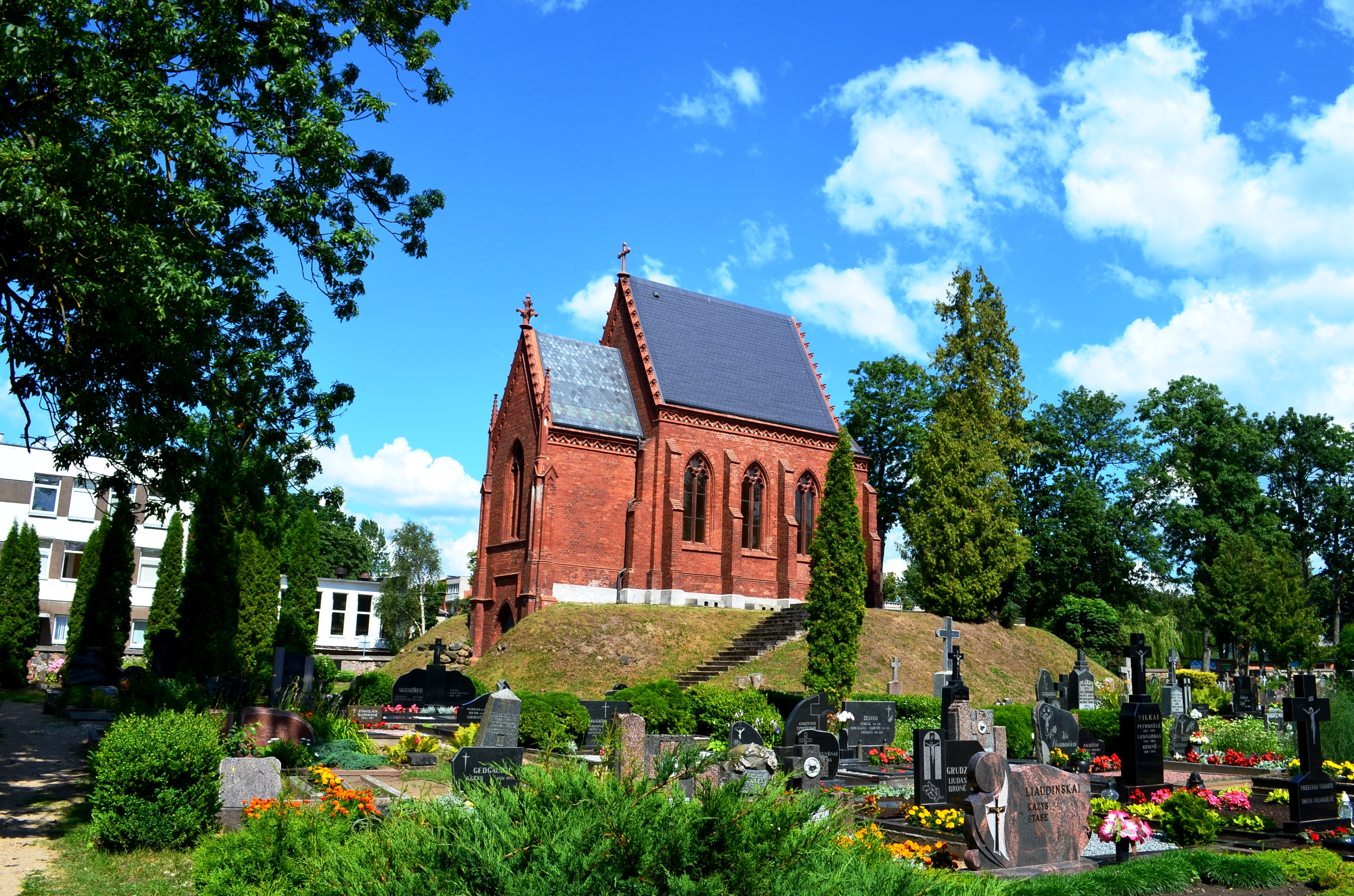 Kretingos kapinių koplyčia